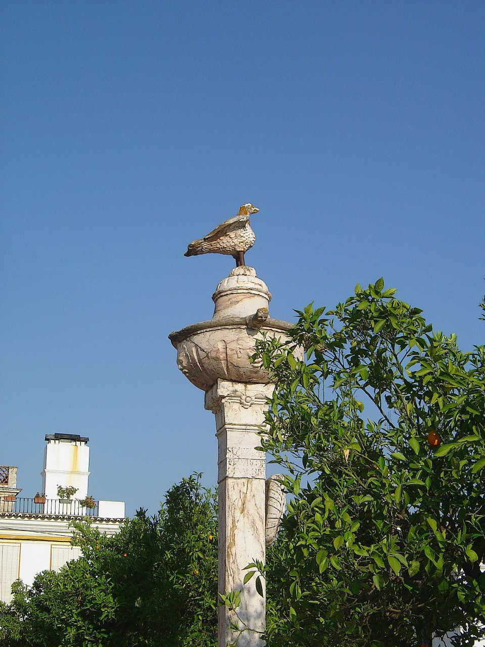 Esta escultura é feita de mármore da região de Estremoz / Borba / Vila Viçosa, não muito distante de Avis